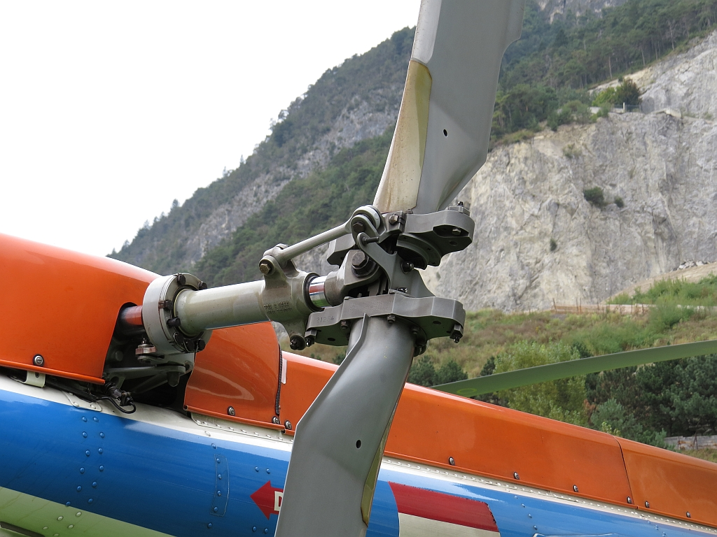 Heckrotor Airbus Helicopters AS 350 B3